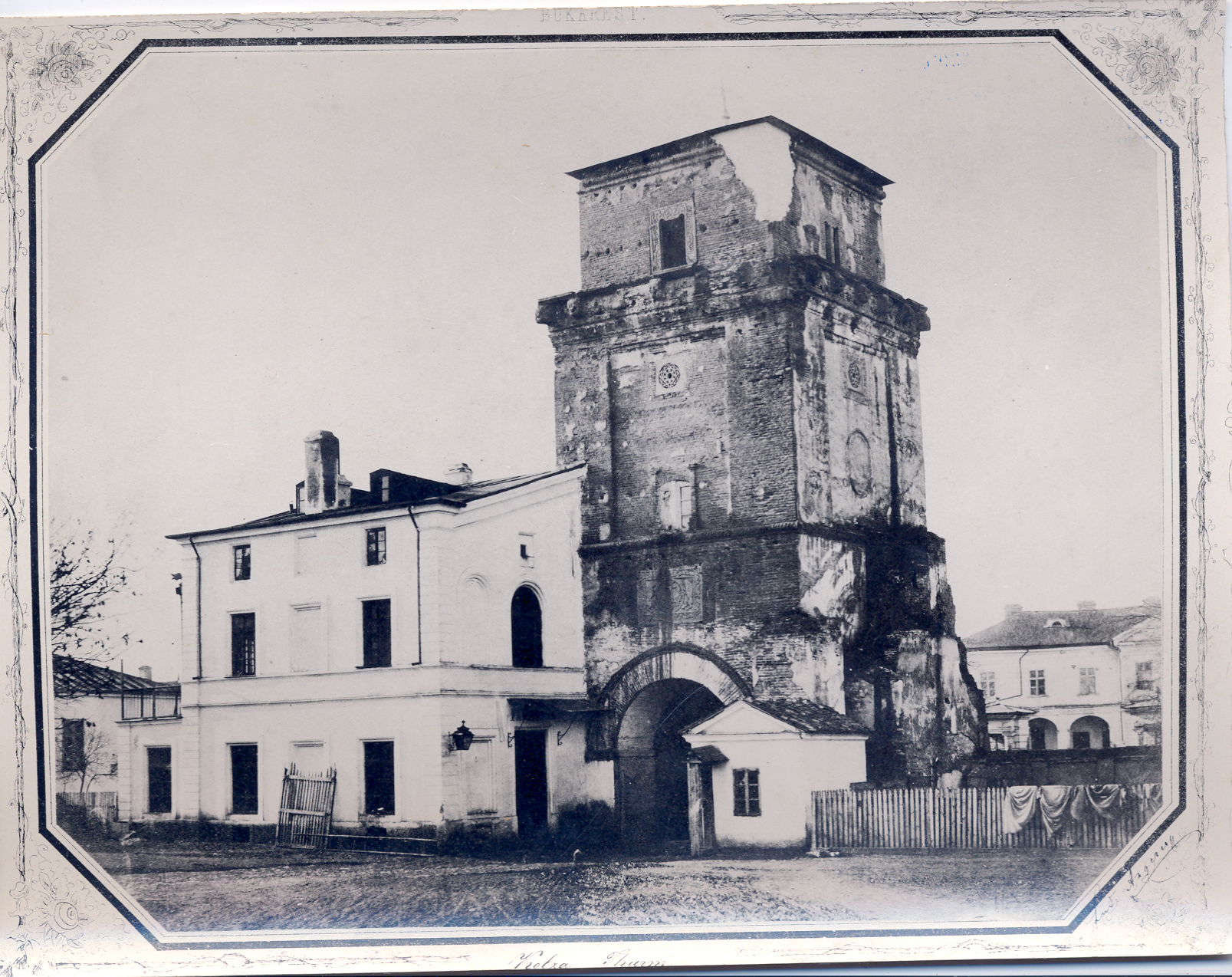 Turnul Colţea